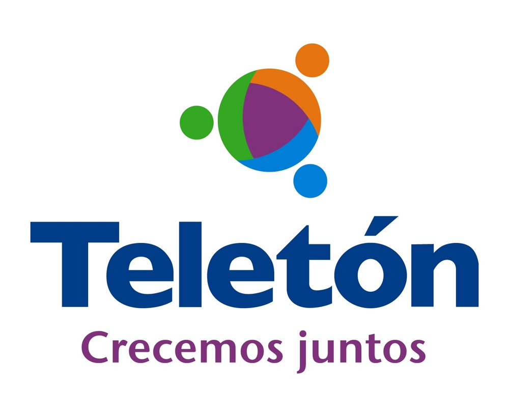 Crecemos juntos